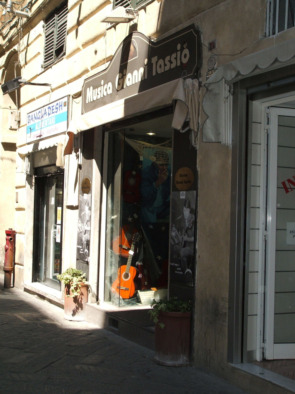 Immagine dalla città di Genova Via del Campo, negozio dedicato a Fabrizio De André